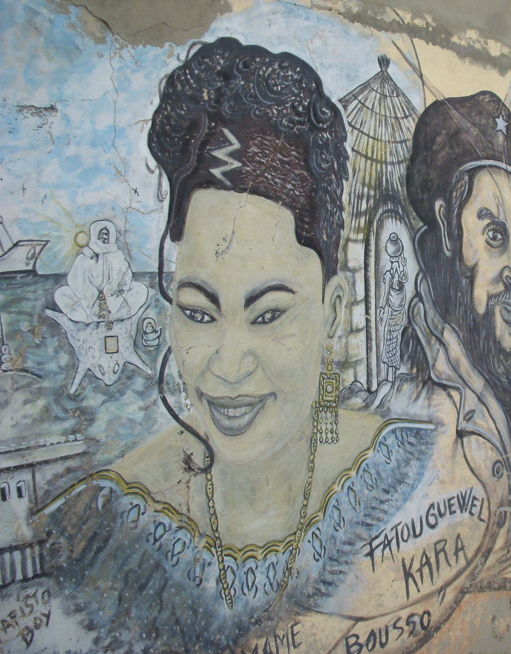 La chanteuse sénégalaise Fatou Guewel (fresque à Dakar, Sénégal)